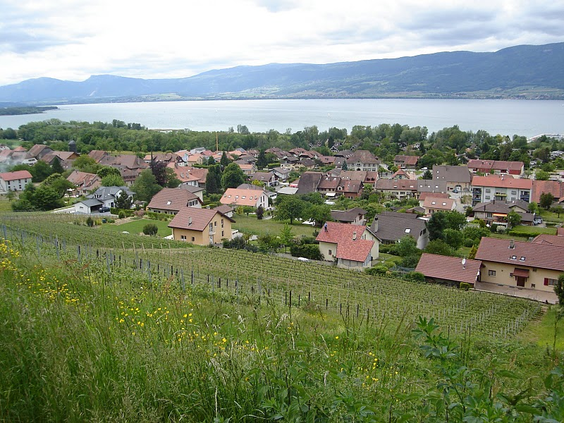 Vue du village de Cheyres (Canton de Fribourg, Suisse) depuis le Chemin Neuf